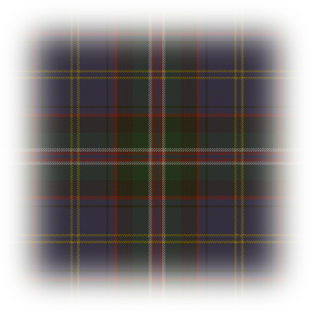 Český národní tartan - oficiální tartan mezinárodně registrovaný pro Českou republiku